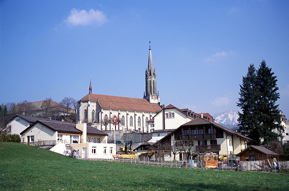 L'église (Kirche) de Châtel-St-Denis